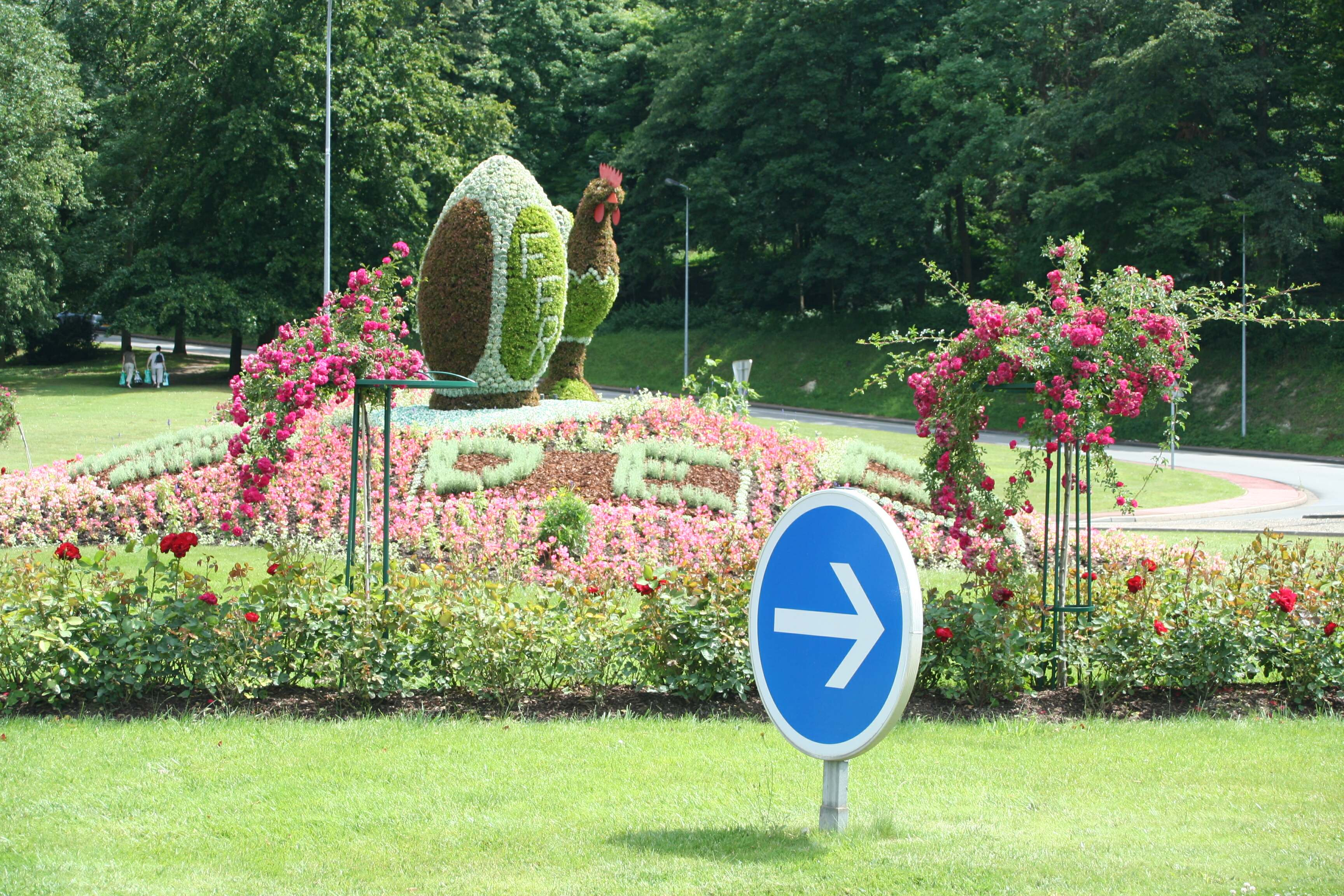 Rond-point sur le CD 113 (avenue de l'Union) de Aubergenville- Yvelines (France)